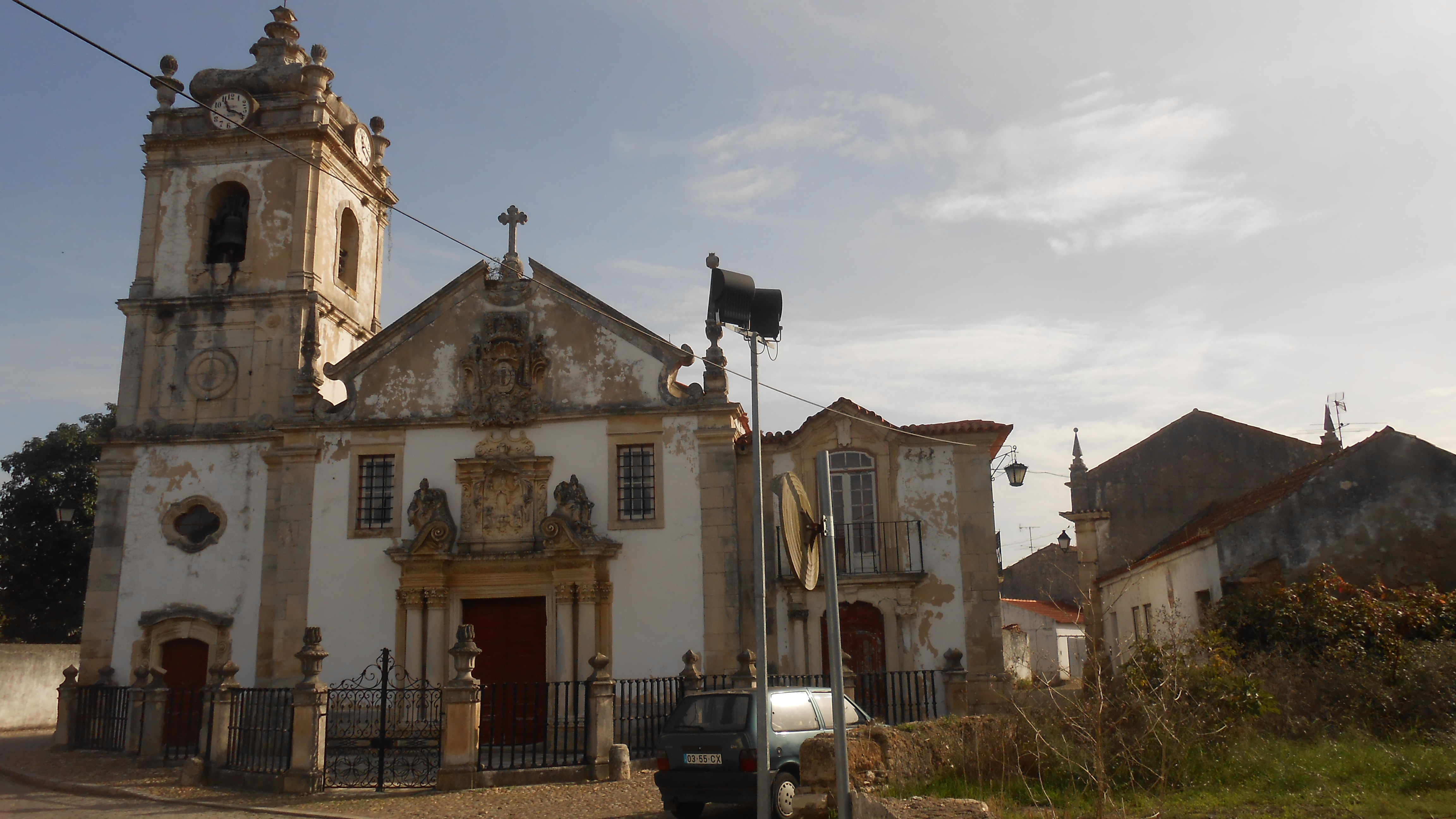 A Igreja da Santa Casa da Misericórdia de Pereira